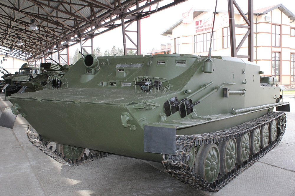 Бронетранспортер БТР-50 в Музее отечественной военной истории